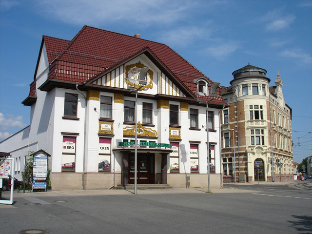 Gebäude Harzquerbahnhof Nordhausen